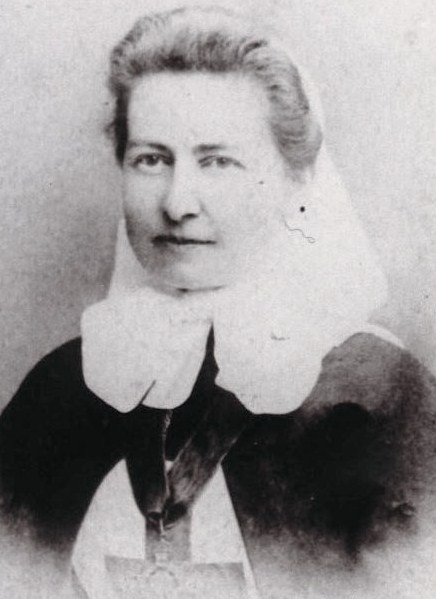 Наталья Ивановна Оржевская, ур. кн. Шаховская (1859—1939)